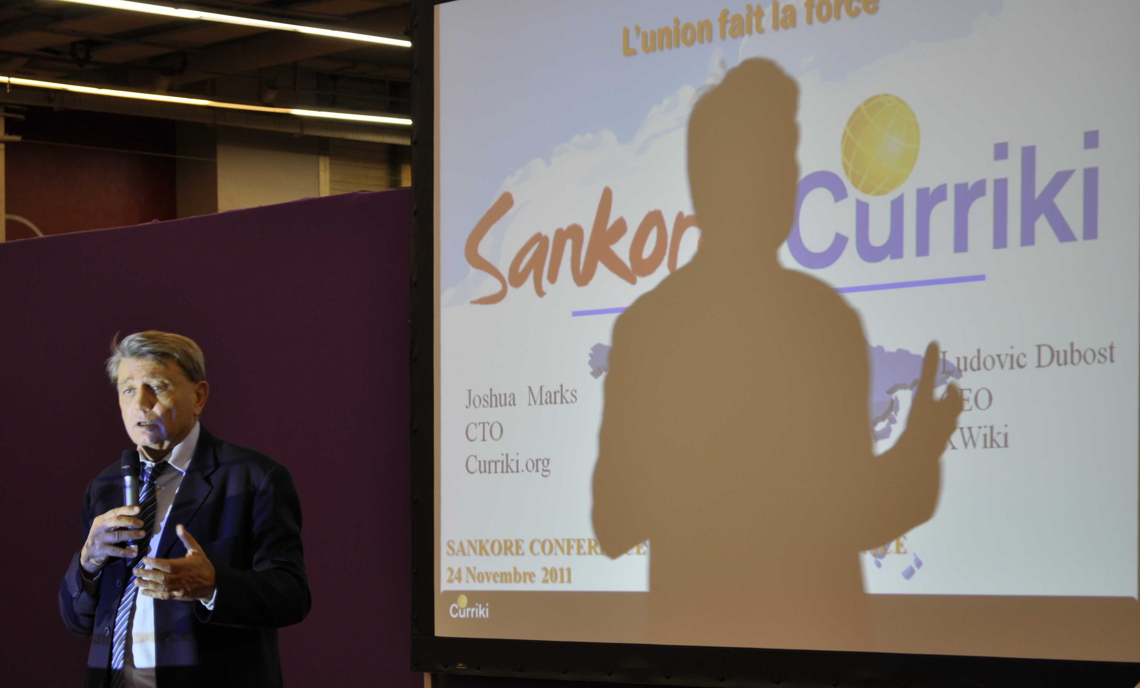 Alain Madelin, président du GIP ENA et du programme Sankoré lors d'une conférence au salon de l'éducation de la porte de Versailles, le jeudi 24 novembre 2011. La conférence s'intitule : "La révolution mondiale des ressources numériques d'enseignement libres et gratuites est en marche : un écosystème international, privé et public, de ressources numériques éducatives libres".